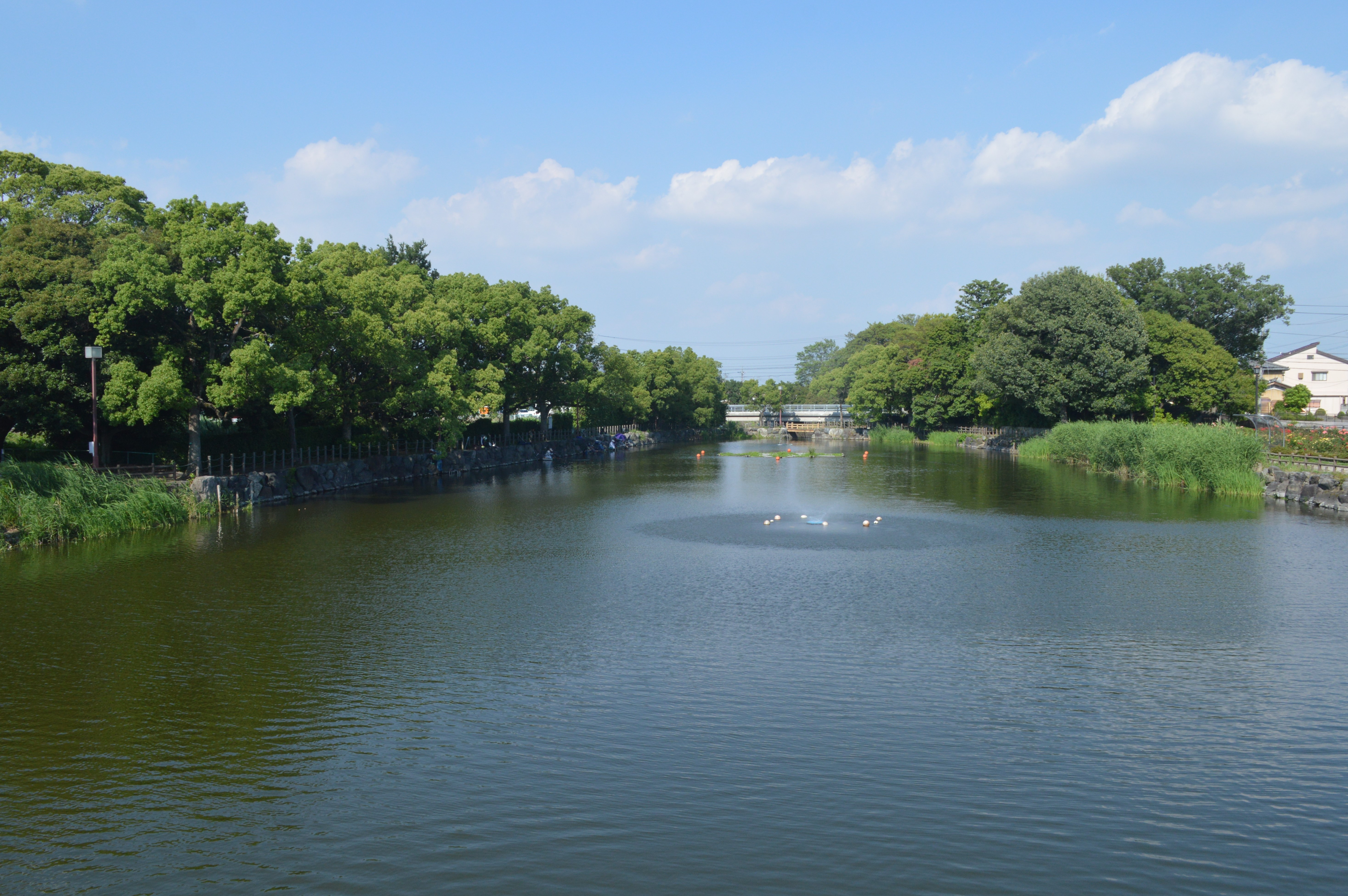 愛知県一宮市にある浅井山公園。